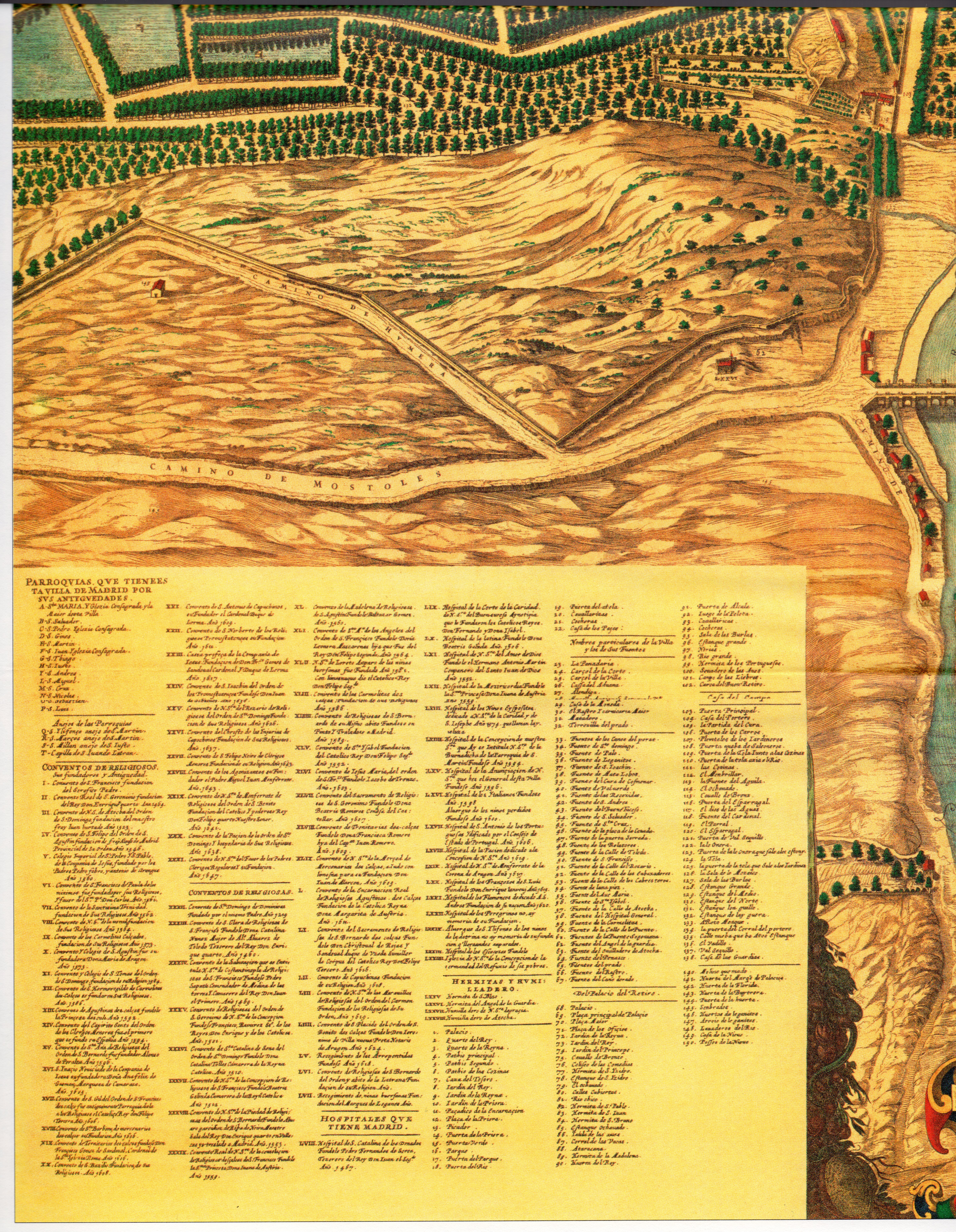 Topografía de la Villa de Madrid descrita por Don Pedro Texeira en 1656, en la cual se demuestran todas las calles al largo y ancho de cada una de ellas, las rinconadas y lo que tuercen las Plazas, fuentes, jardines y huertas con la disposición que tienen las parroquias, Monasterios y Hospitales están señalados sus nombres con letras y números que se hallaran en la tabla y los demás edificios, torres y delanteras de las casas de la parte que mira al Mediodía están sacadas al natural que se podrán tocar las puertas y ventanas de cada una de ellas.